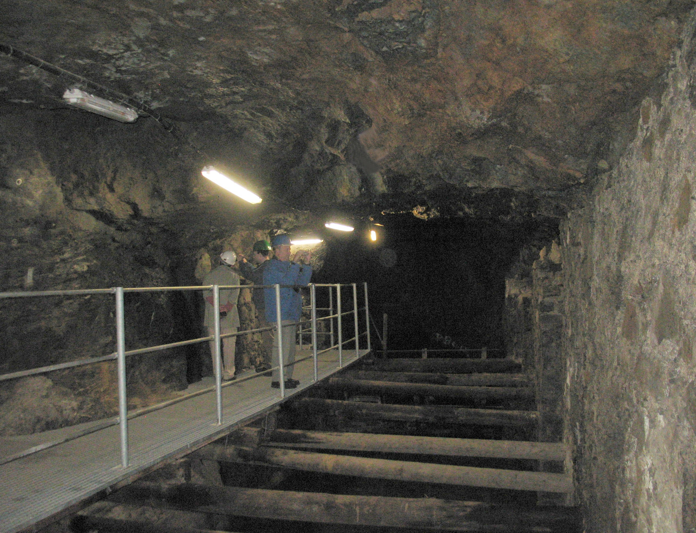 U vodního kola